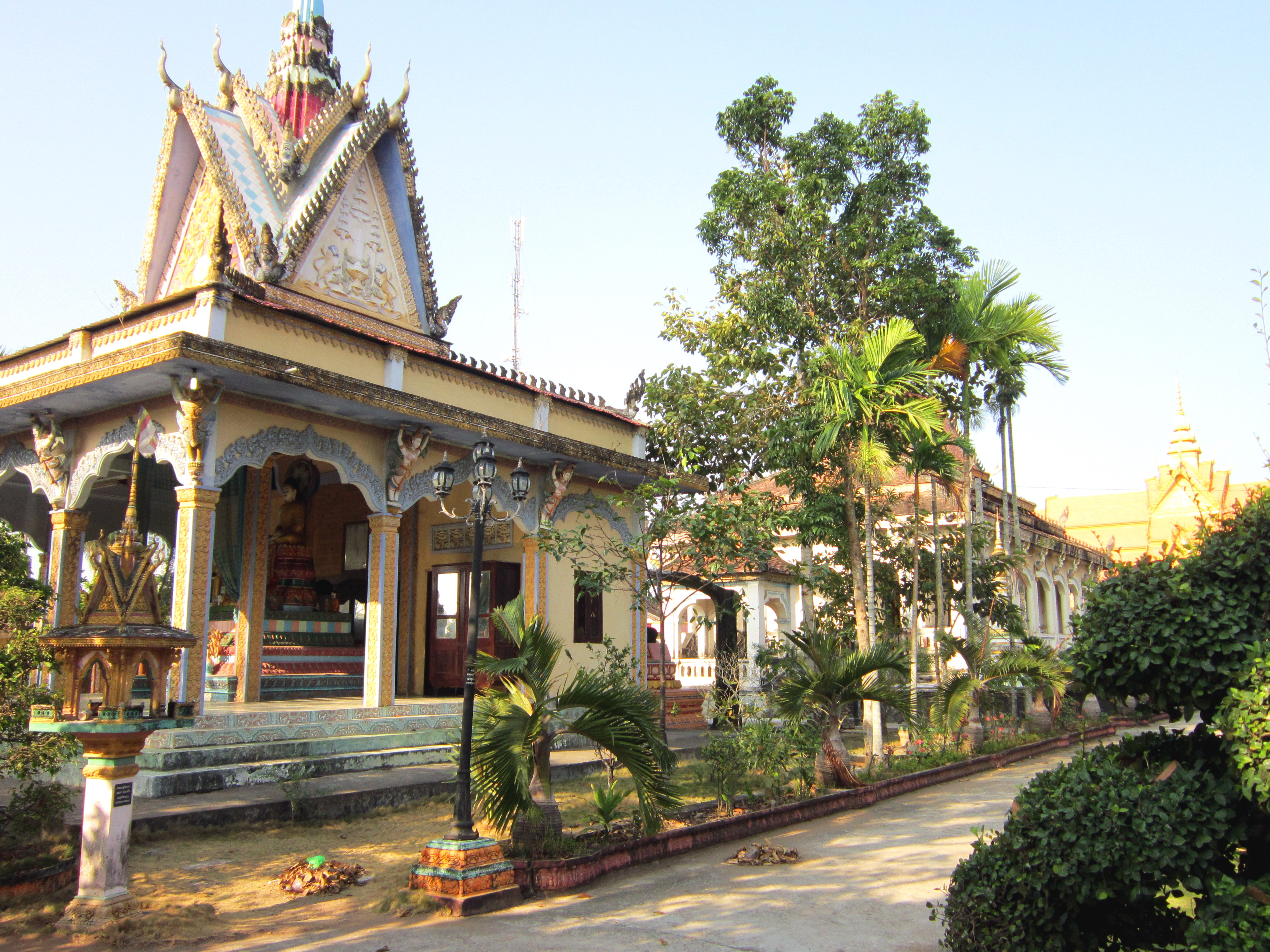 Chùa Kompong Ksan hiện tọa lạc trong nội ô thành phố Trà Vinh (Trà Vinh, Việt Nam).